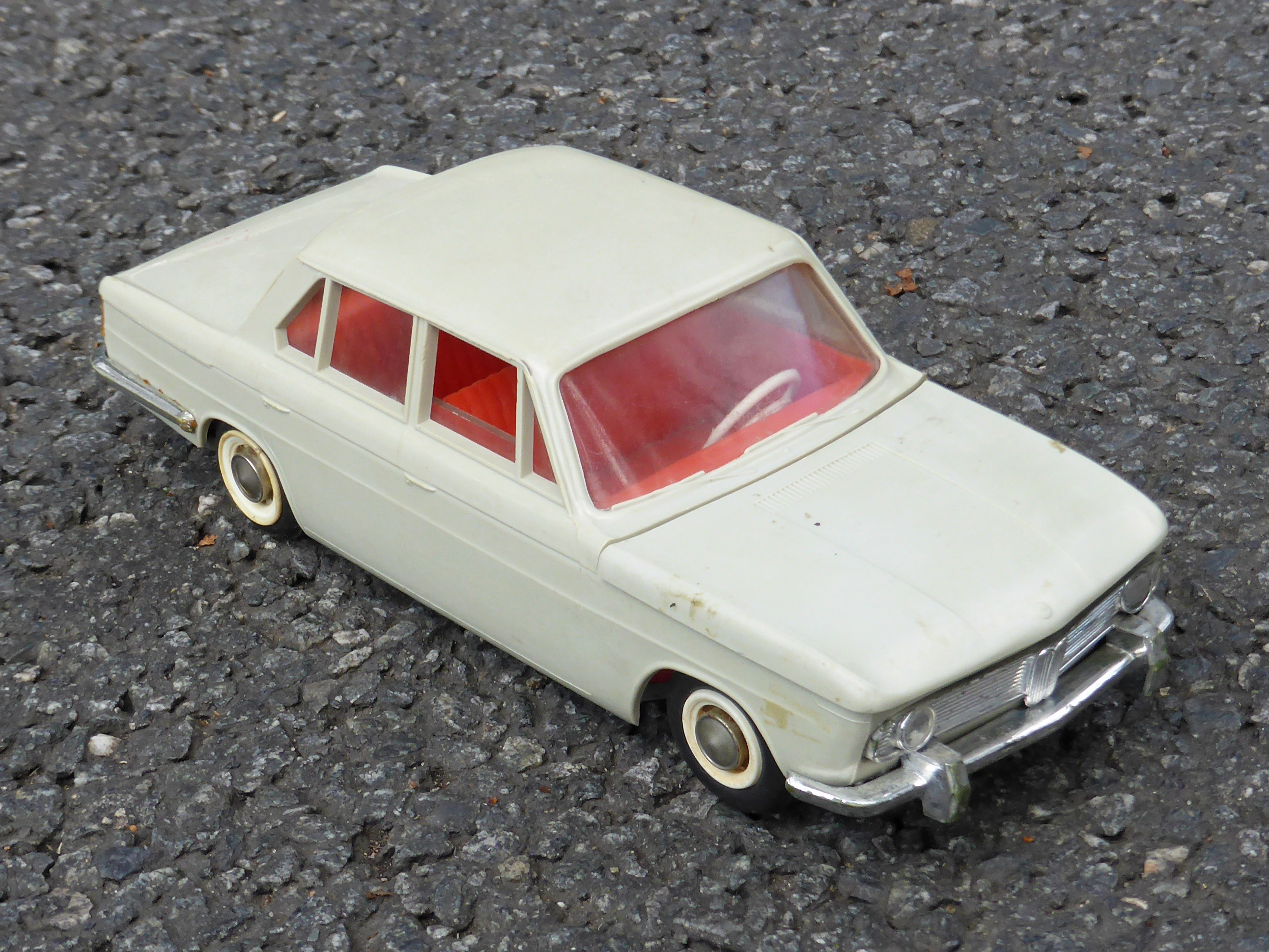 Modellauto "BMW 1800" von GAMA im Maßstab 1:21.